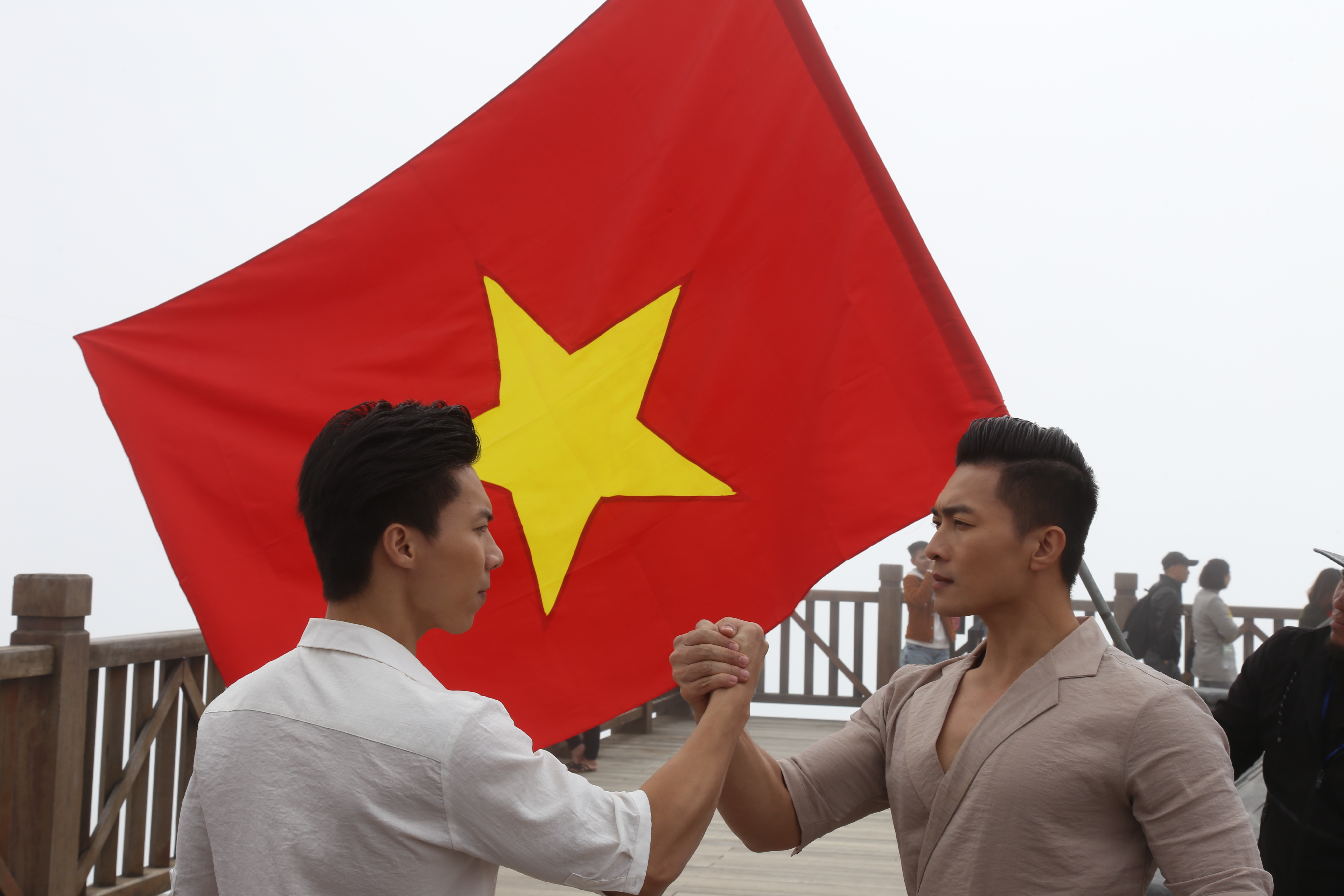 Quốc Cơ Quốc Nghiệp Giang Brothers